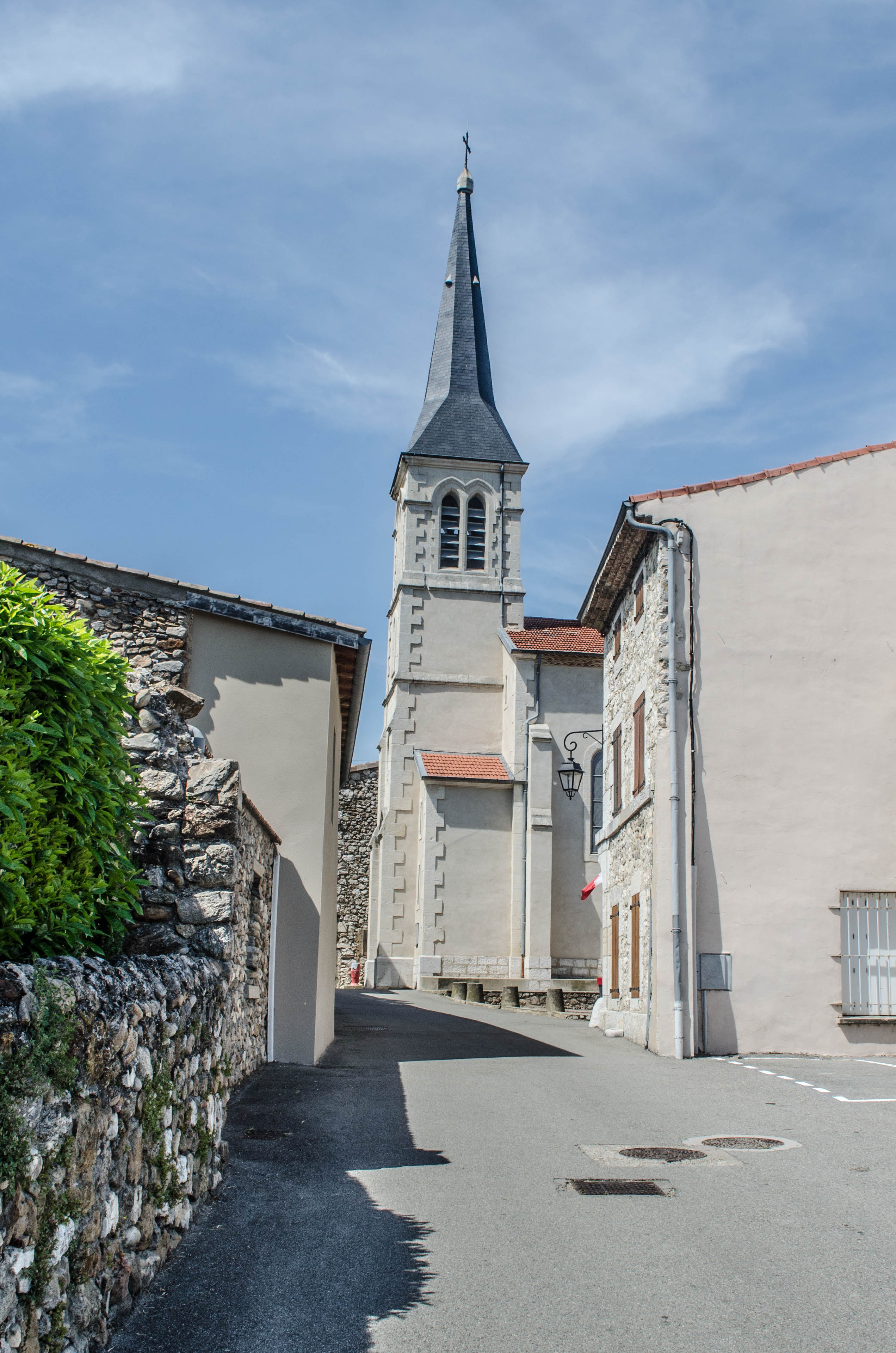 Châteaubourg, Ardèche, France. L’église.